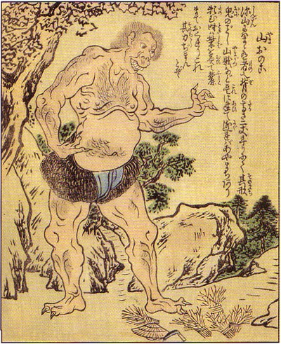 Yama-otoko (山男) from the Ehon Hyaku Monogatari (絵本百物語)